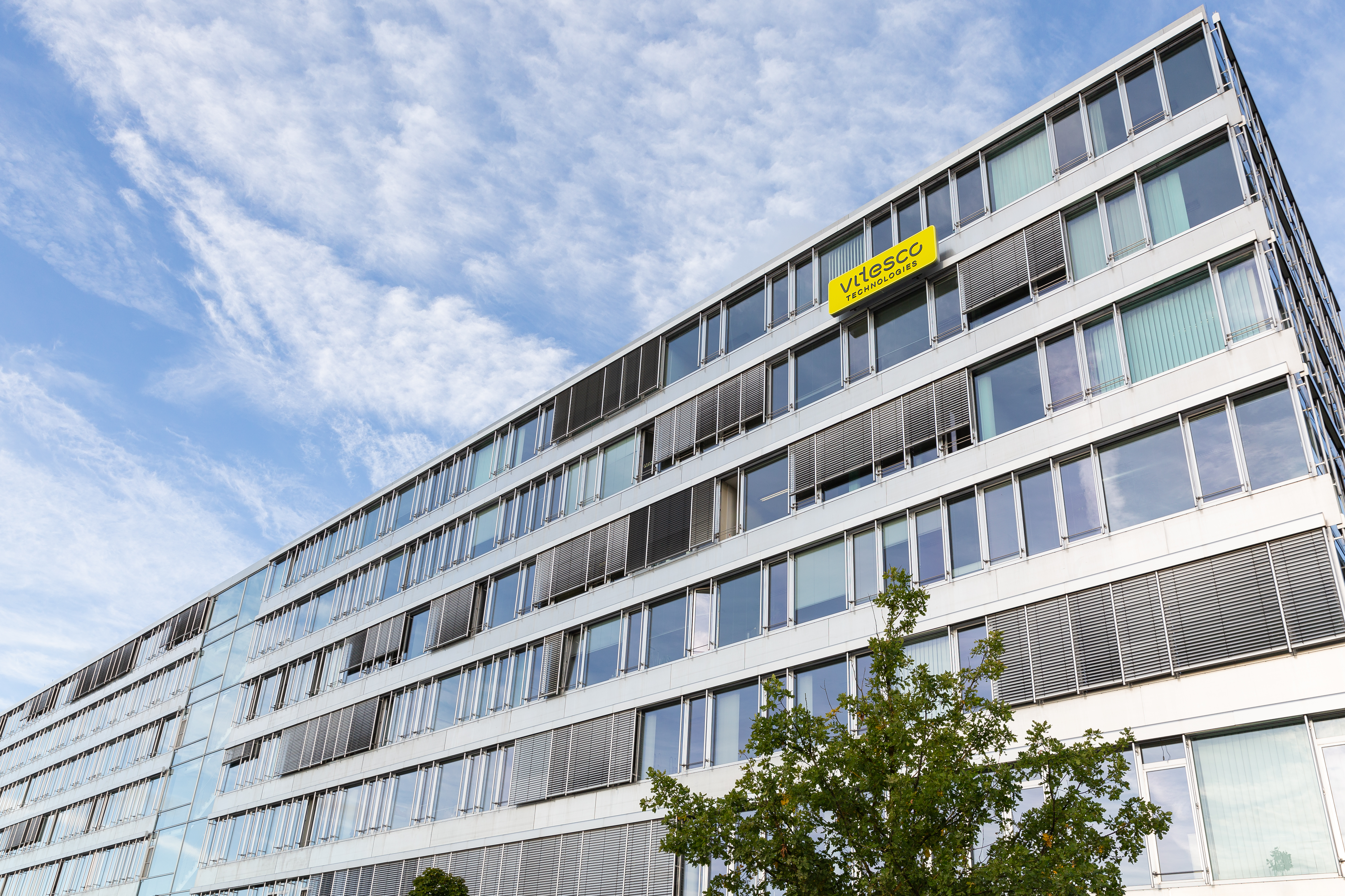 Location Vitesco (Regensburg)